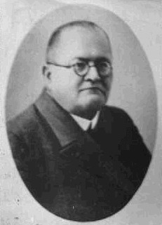 Josef Václav Vojáček (1874 - 1958), Český římskokatolický kněz.